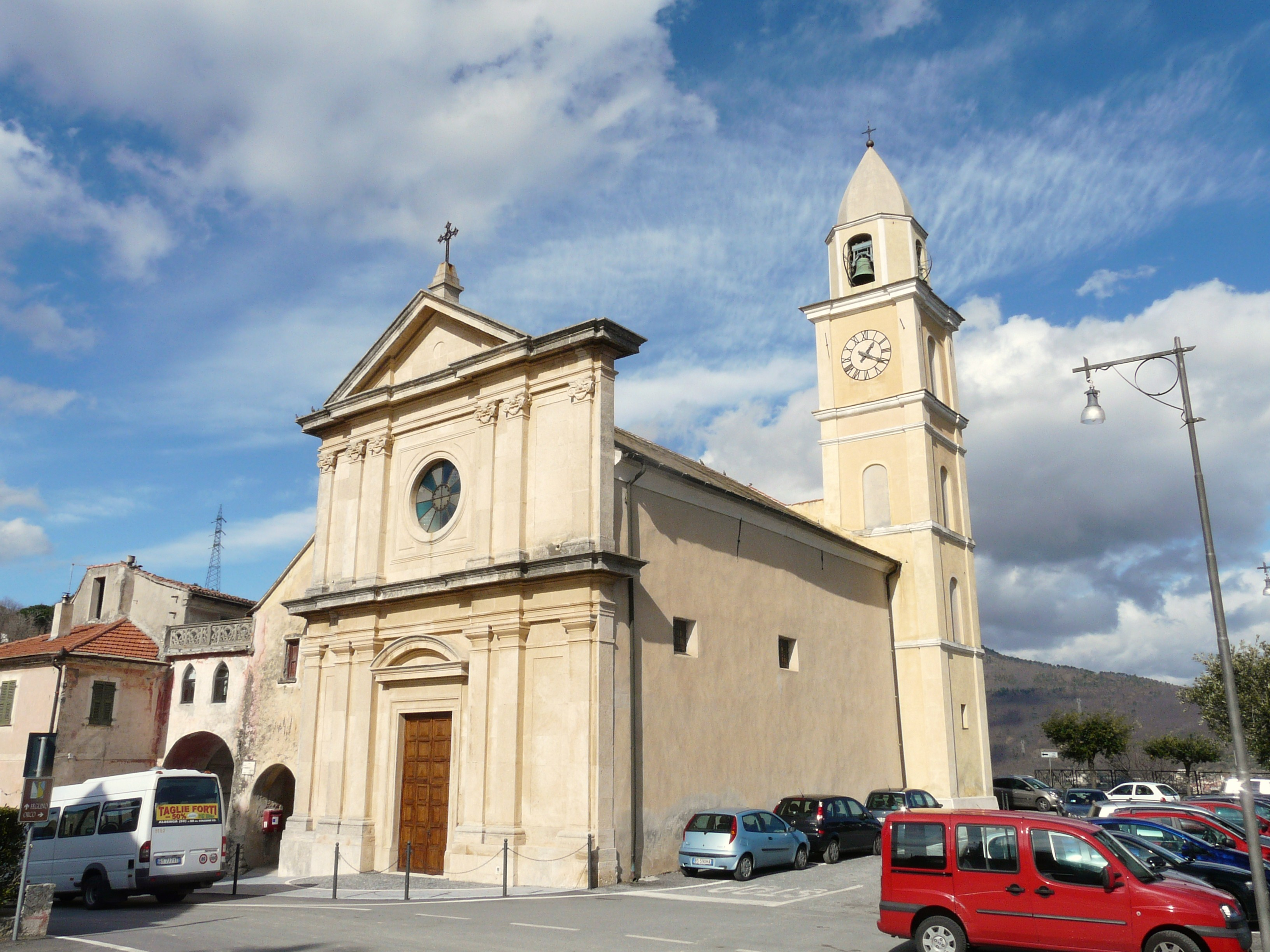 Chiesa di San Lorenzo di Orco, Orco Feglino, Liguria, Italia